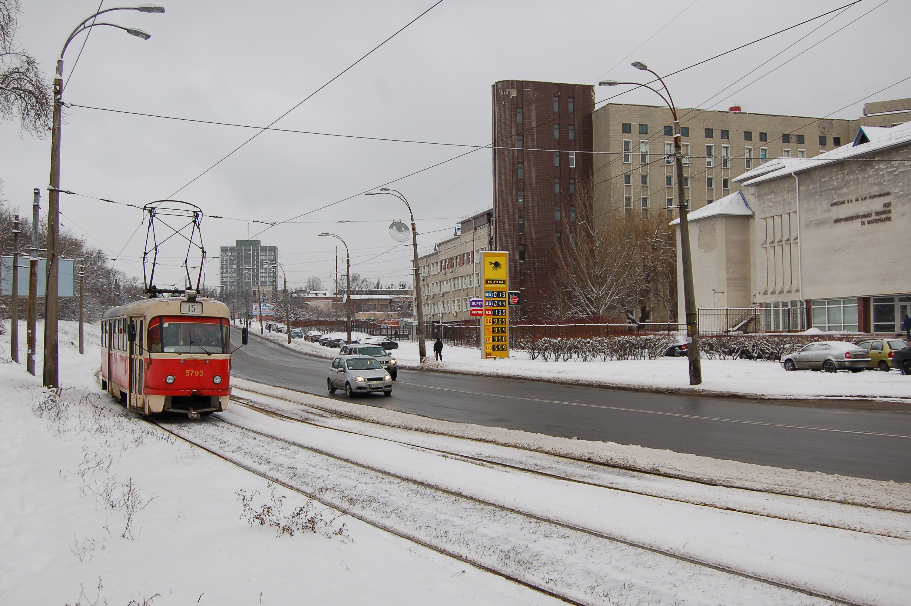 Улица Николая Василенко в Киеве